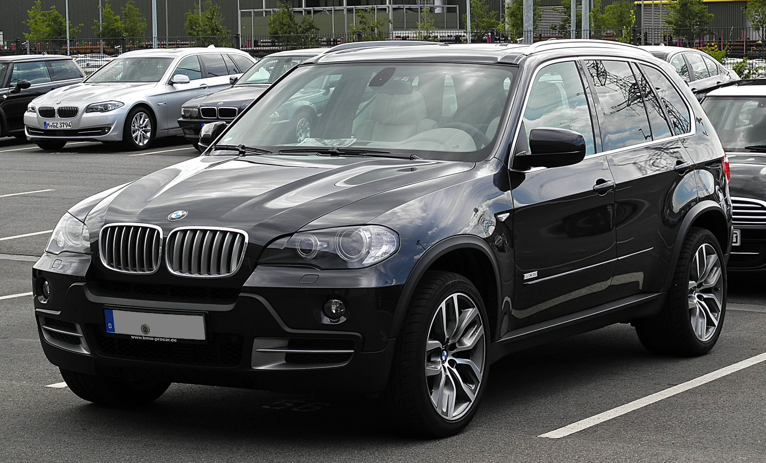 BMW X5 Edition 10 Jahre X5 (E70)